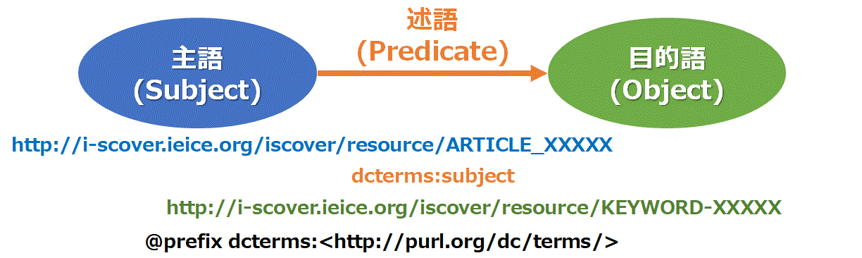 RDFのTriple構造